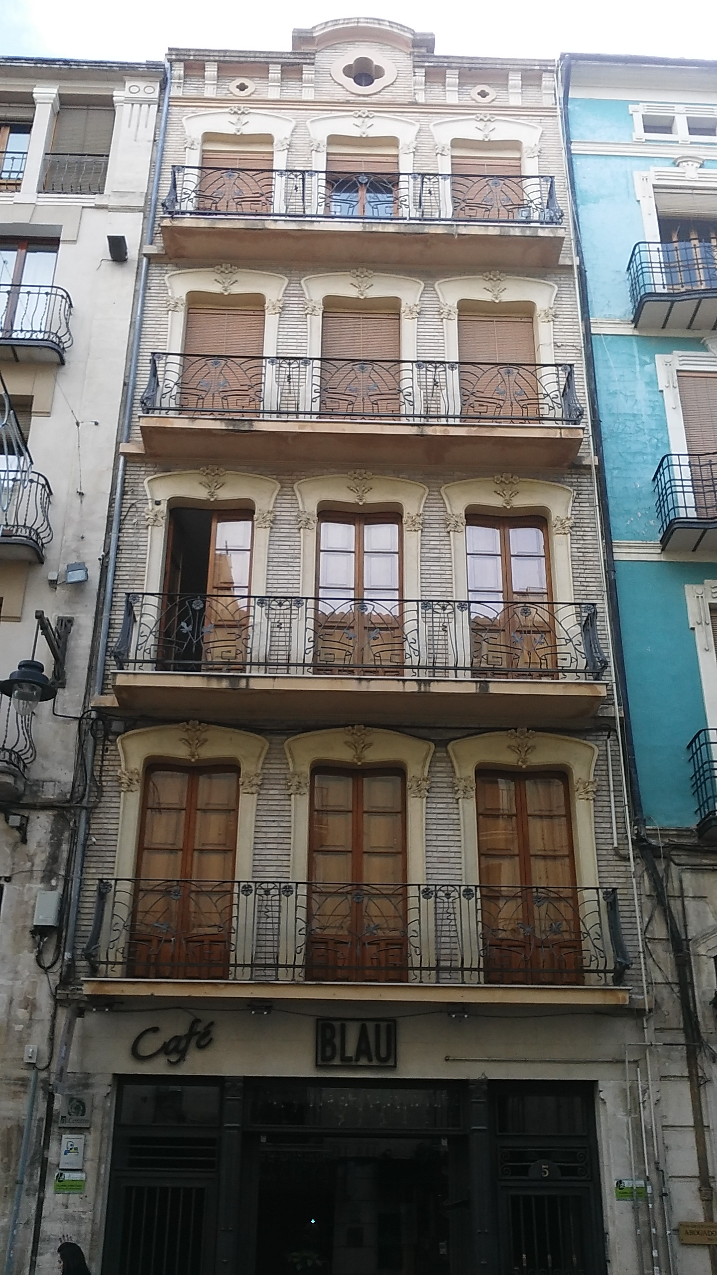 Edificis modernistes en carrer Sant Llorenç 3 i 5, en Alcoy (Alacant). Obra de l'arquitecte Timoteu Briet Montaud.